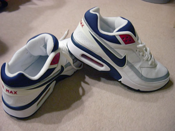 Une paire de Nike Air Max IV (Air Classic BW) - Chaussures détente et course à pied.